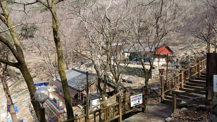 한국어 (조선): 단석산에서 촬영한 신선사